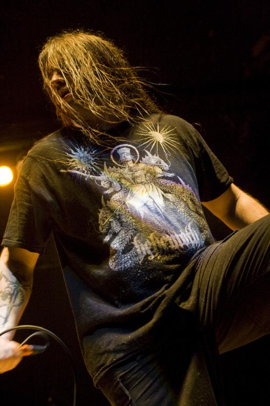 George "Corpsegrinder" Fisher of Cannibal Corpse Live @ Santana Hall - 21/02/2010 - São Paulo, Brasil É proibida a cópia ou reprodução deste material sem a autorização do autor. Por favor, não publique nada daqui sem o devido crédito. Fotógrafo: Alexandre Cardoso